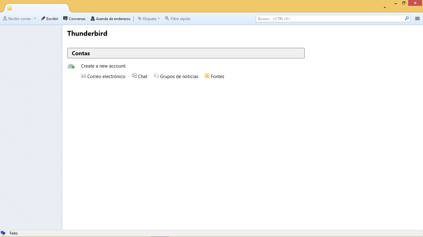 Mozilla Thunderbird 24.5.0 en galego en Windows 8.1